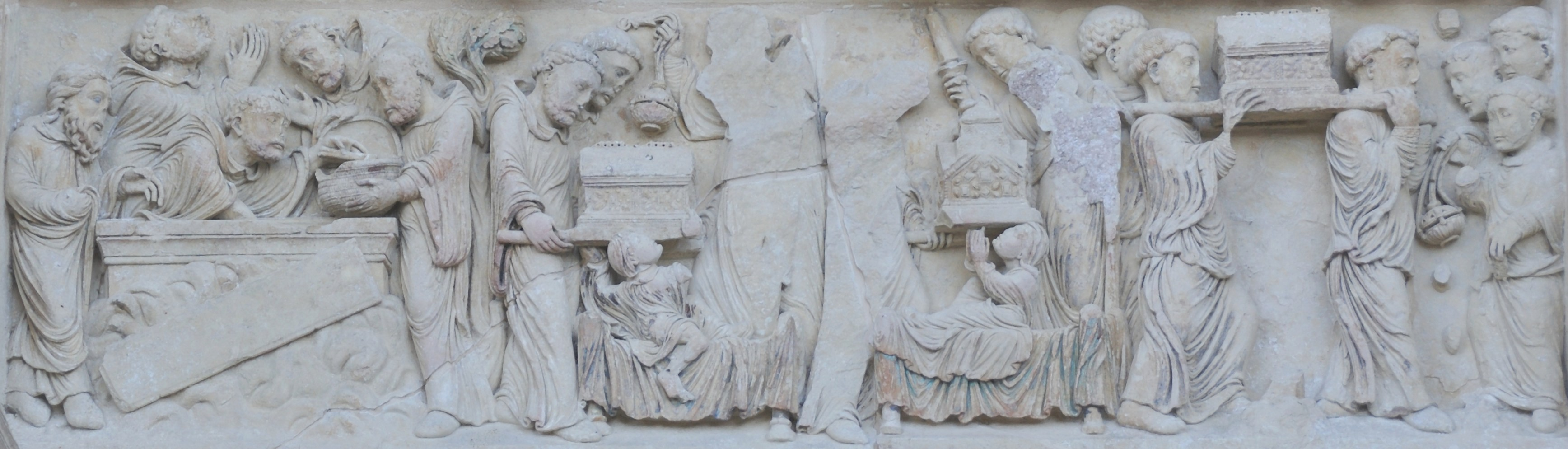 Le linteau du portail nord de l'église abbatiale de Saint-Benoît-sur-Loire représente la translation des reliques de saint Benoît. Sur la gauche, les moines récupèrent les ossements au mont Cassin. Au centre, un miracle permet de distinguer les restes de saint Benoît de ceux de sa sœur sainte Scolastique. Enfin, à droite, les villageois accueillent les reliques dans la ferveur.